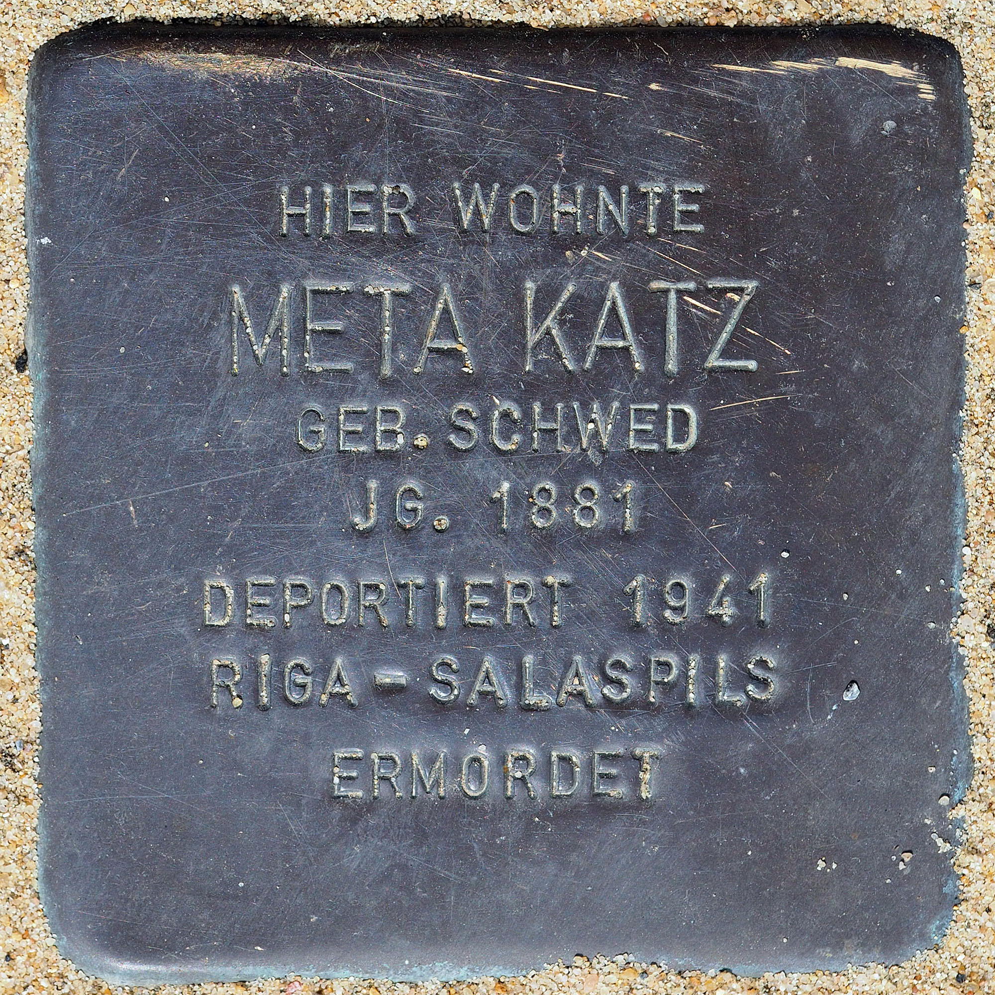 Stolpersteine GV: Katz, Meta